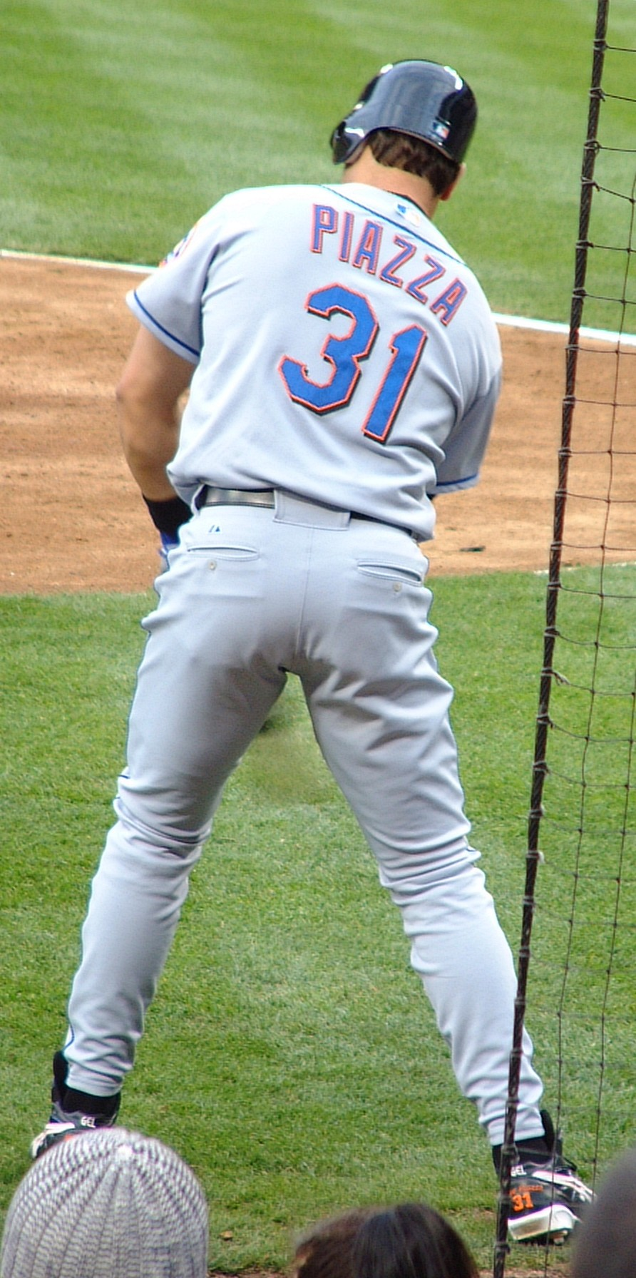 Mike Piazza of NY Mets